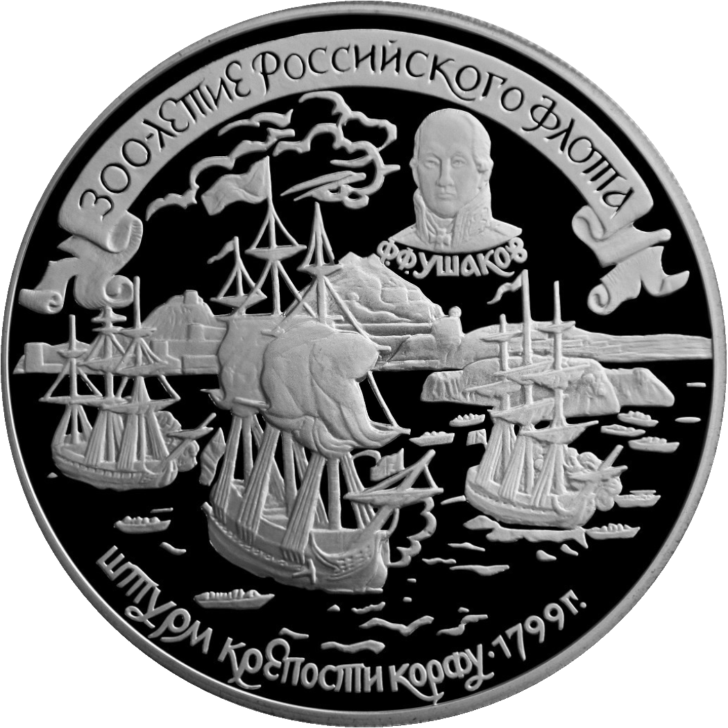 Монета Банка России — Серия: «Флот», 300-летие Российского флота, 25 рублей — Штурм крепости Корфу, реверс